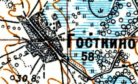 Топографическая карта Ленинградской области, квадрат Vc-29 (Батецкая), деревня Госткино